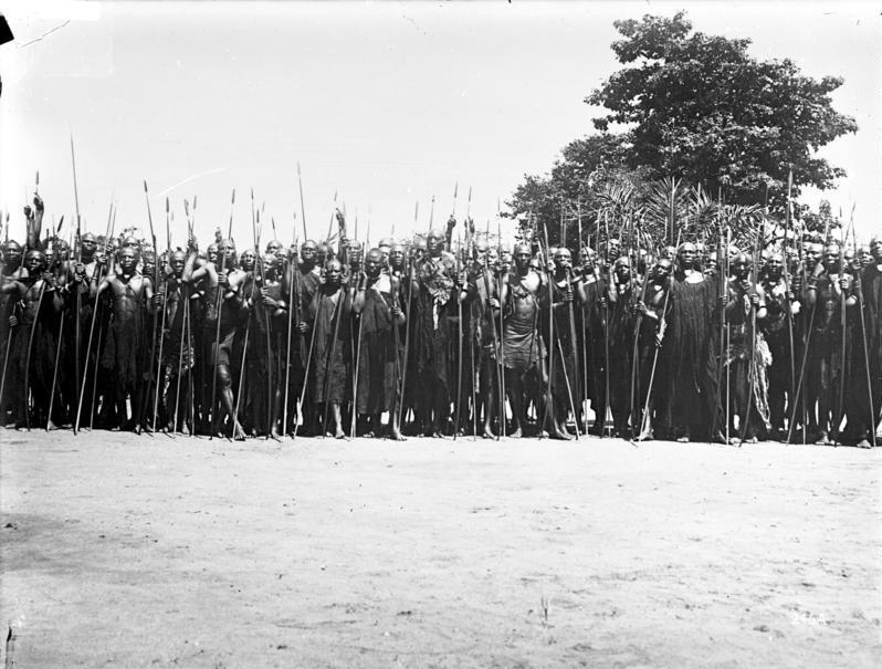 Leute des Königs Kasliwami von Urundi